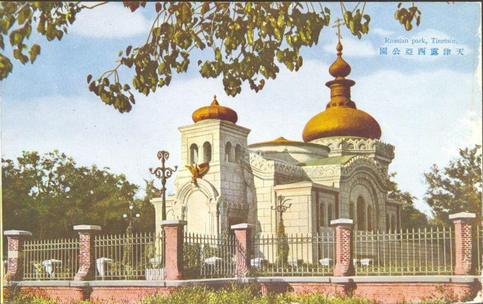 Православная церковь в Тяньцзине (Tianjin)